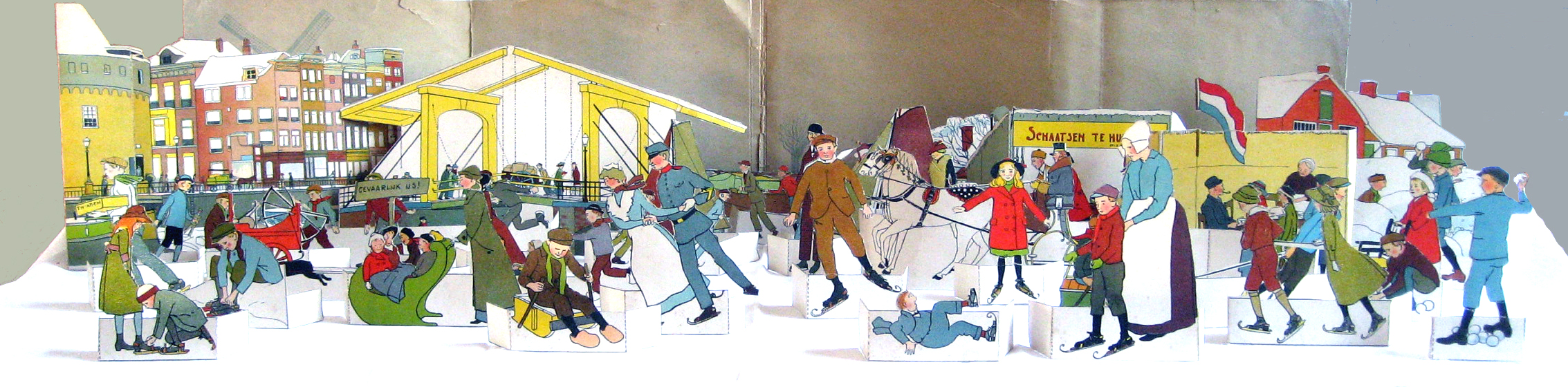 uitgestalde opzetfiguren uit Jong Holland op Schaatsen, een dag op het ijs, getekend door Jan Rinke, uitgegeven door Scheltens & Giltay